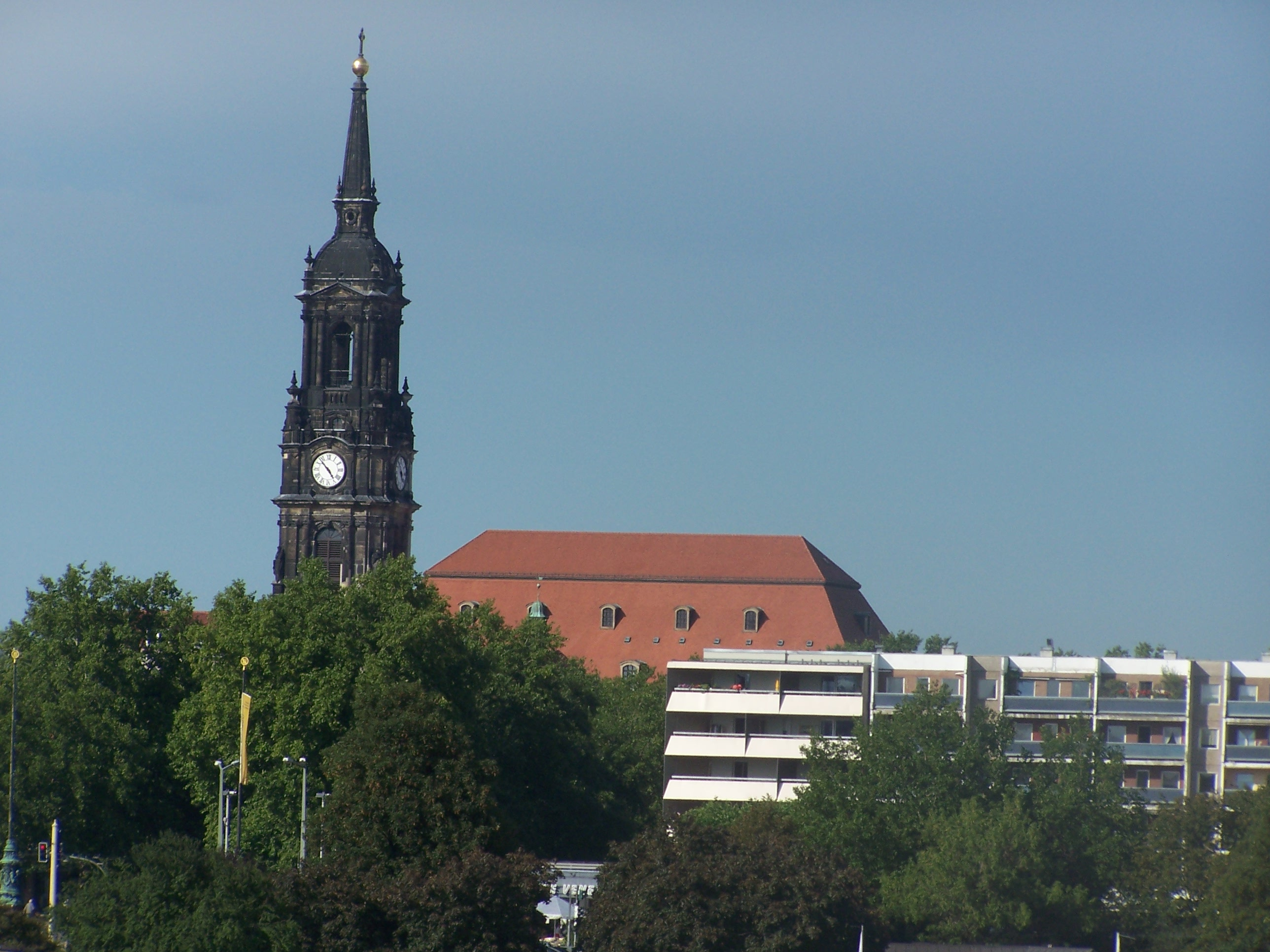 evangelische Dreikönigskirche in Dresden